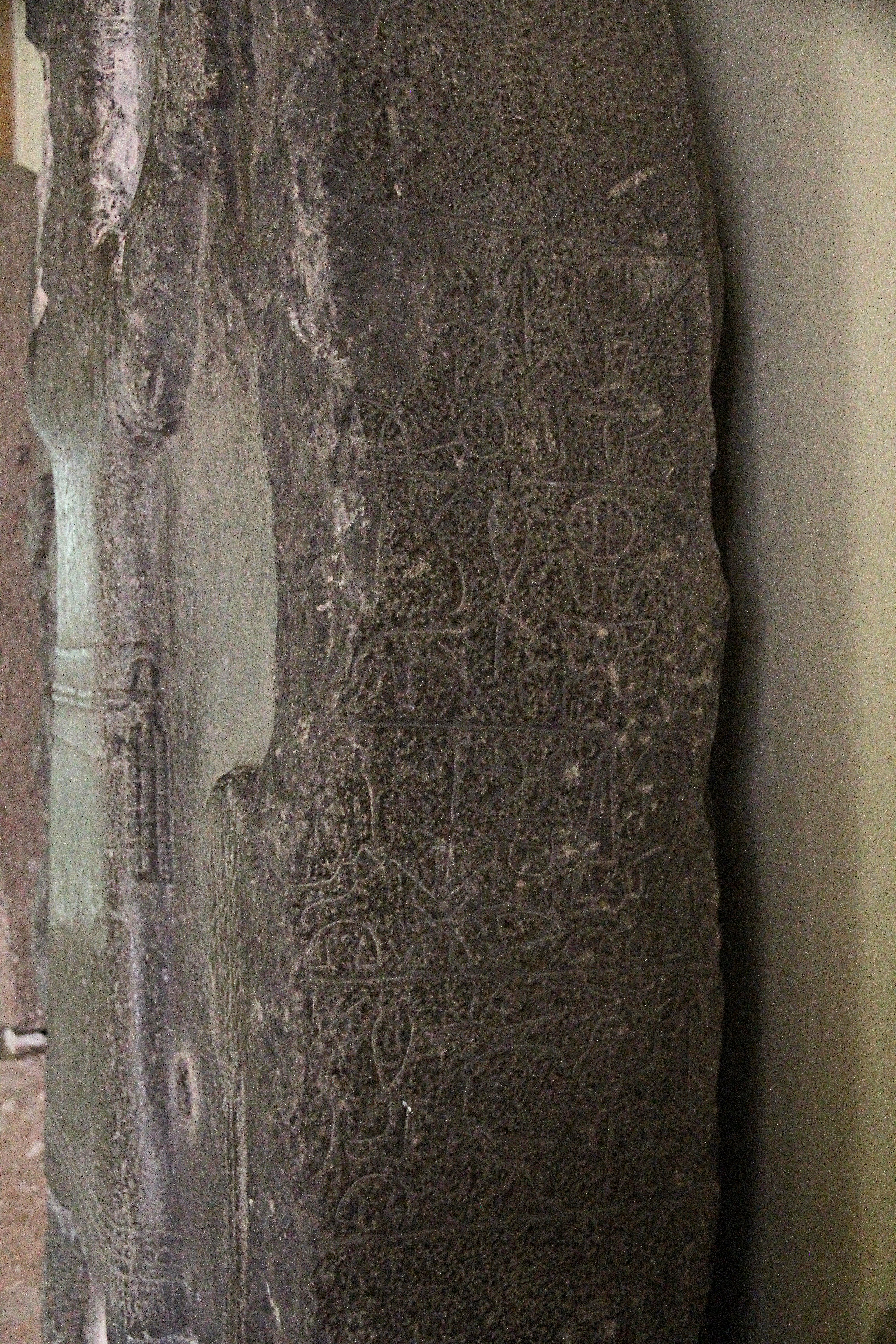 Archäologisches Museum Niğde, Türkei, Stele von Niğde, Seitenansicht mit Hieroglyphen-luwischer Inschrift. Die Stele zeigt den Wettergott, sie wurde von Muwaharanis errichtet und seinem Vater Warpalawas gewidmet.